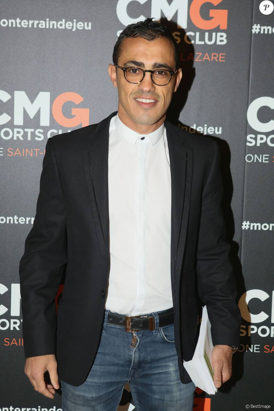 Redouane ASLOUM à l'inauguration du CMG Saint-Lazare